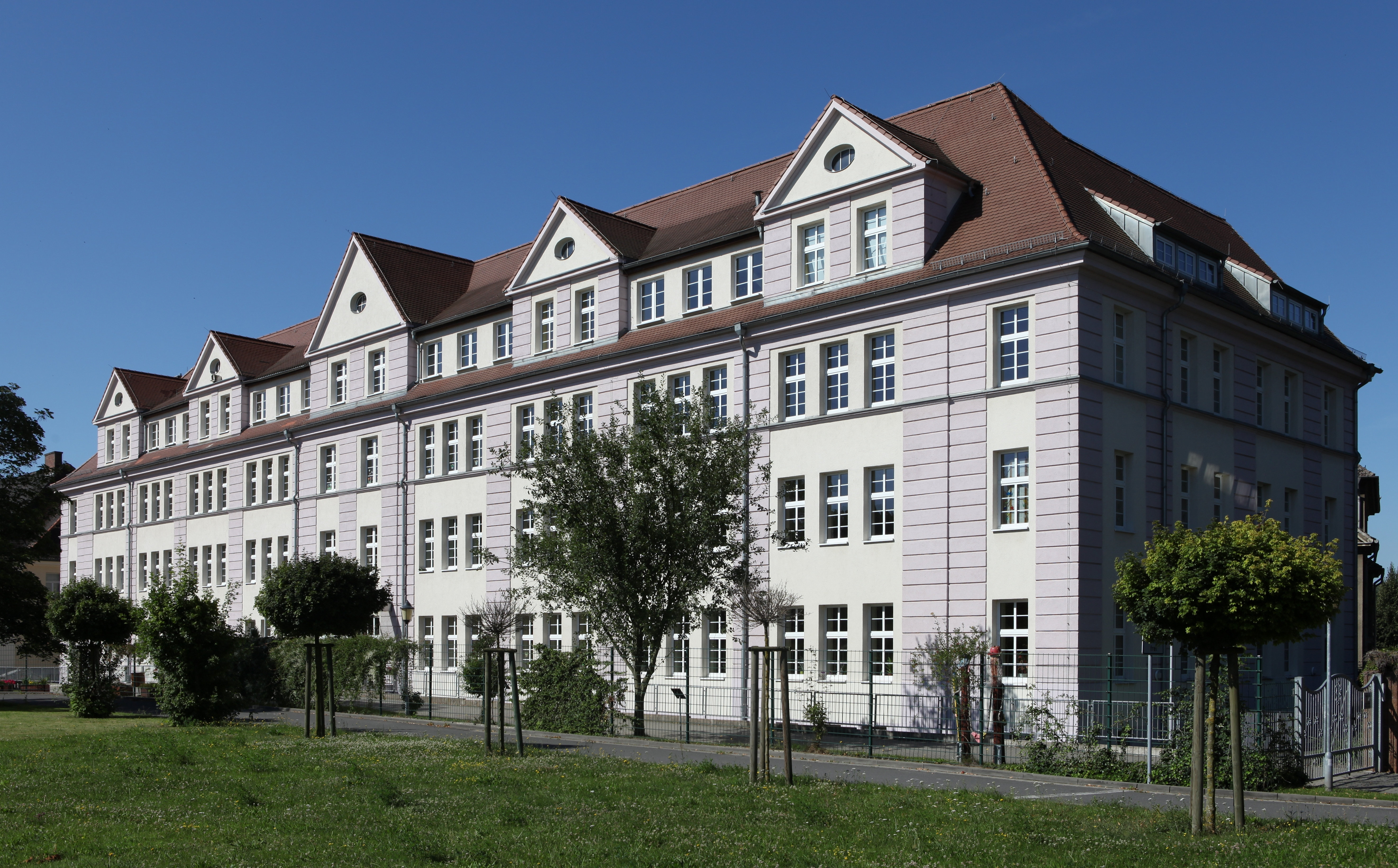 Kulturdenkmal Schule Dr.-Belian-Straße 2 (ehemals Kaserne) in Eilenburg; Objektnummer: 08973234